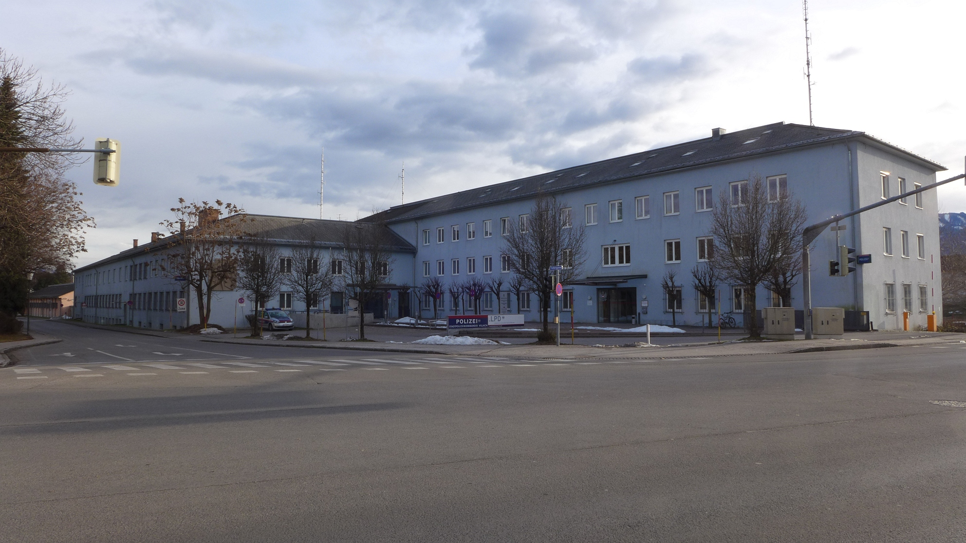 A karintiai rendőrségi központ Villachban